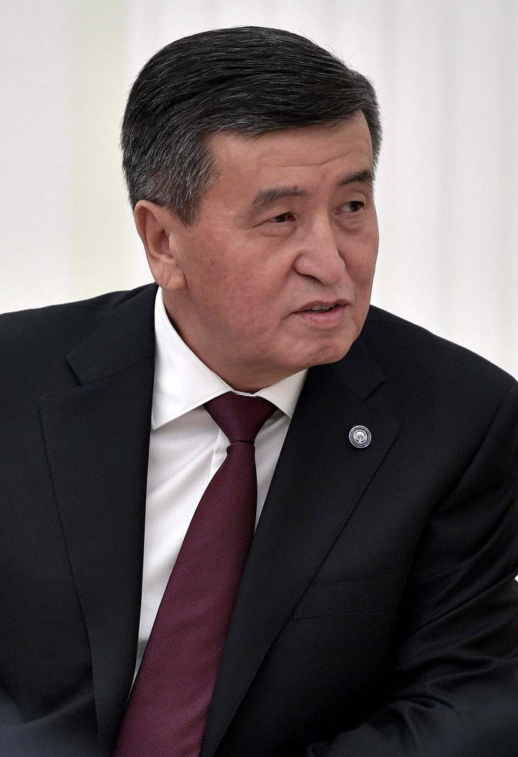 Президент Киргизской Республики Сооронбай Жээнбеков во время переговоров с Владимиром Путиным